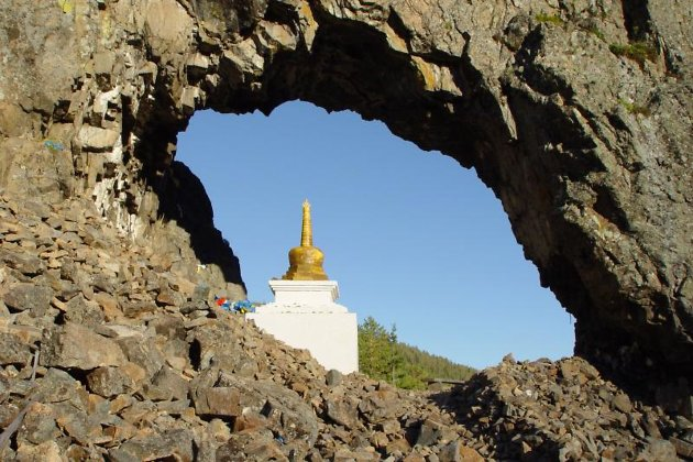 Национальный парк «Алханай». This image is related to the protected area of Russia number 7500031